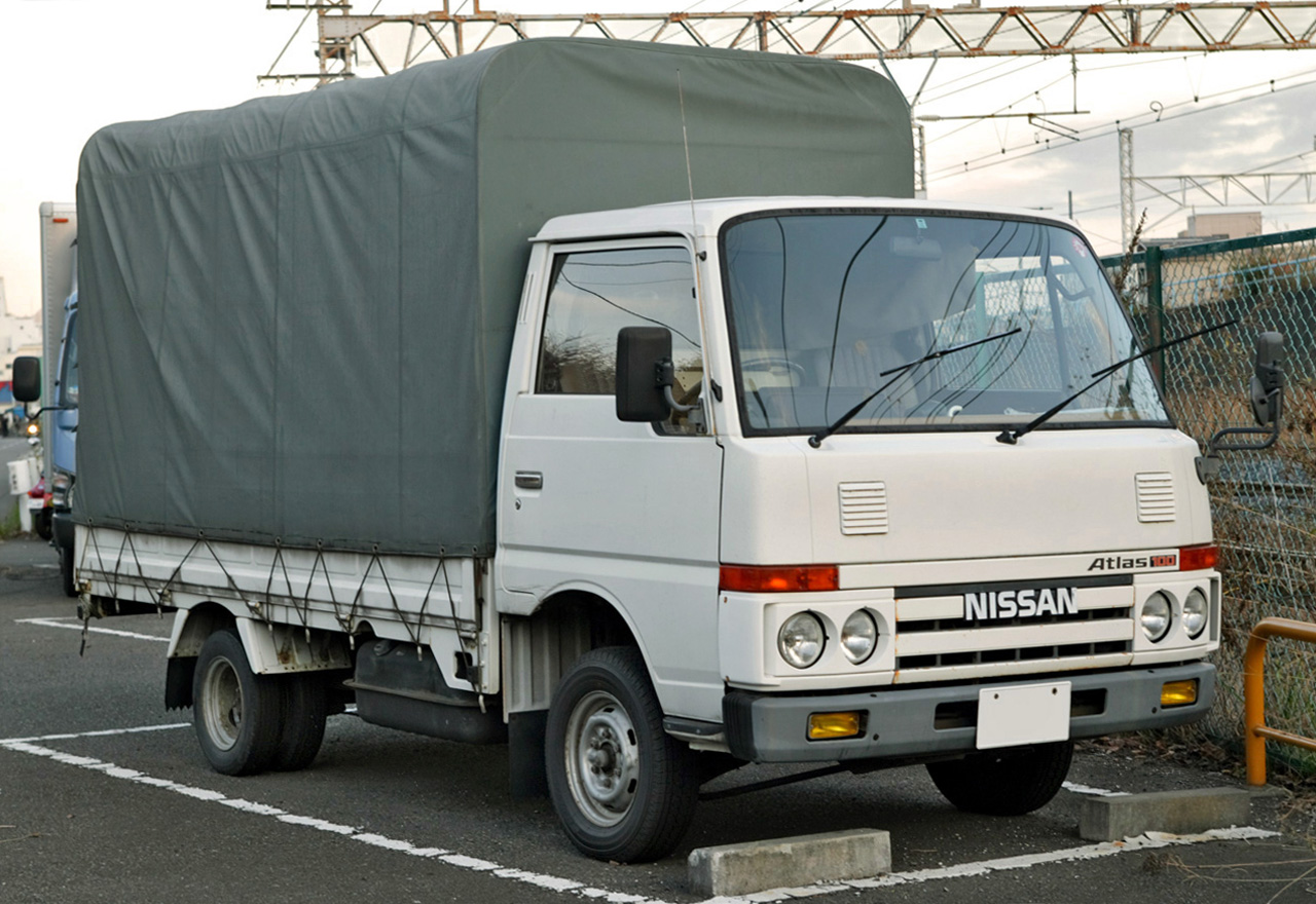 Nissan Atlas 100 ( F22 )